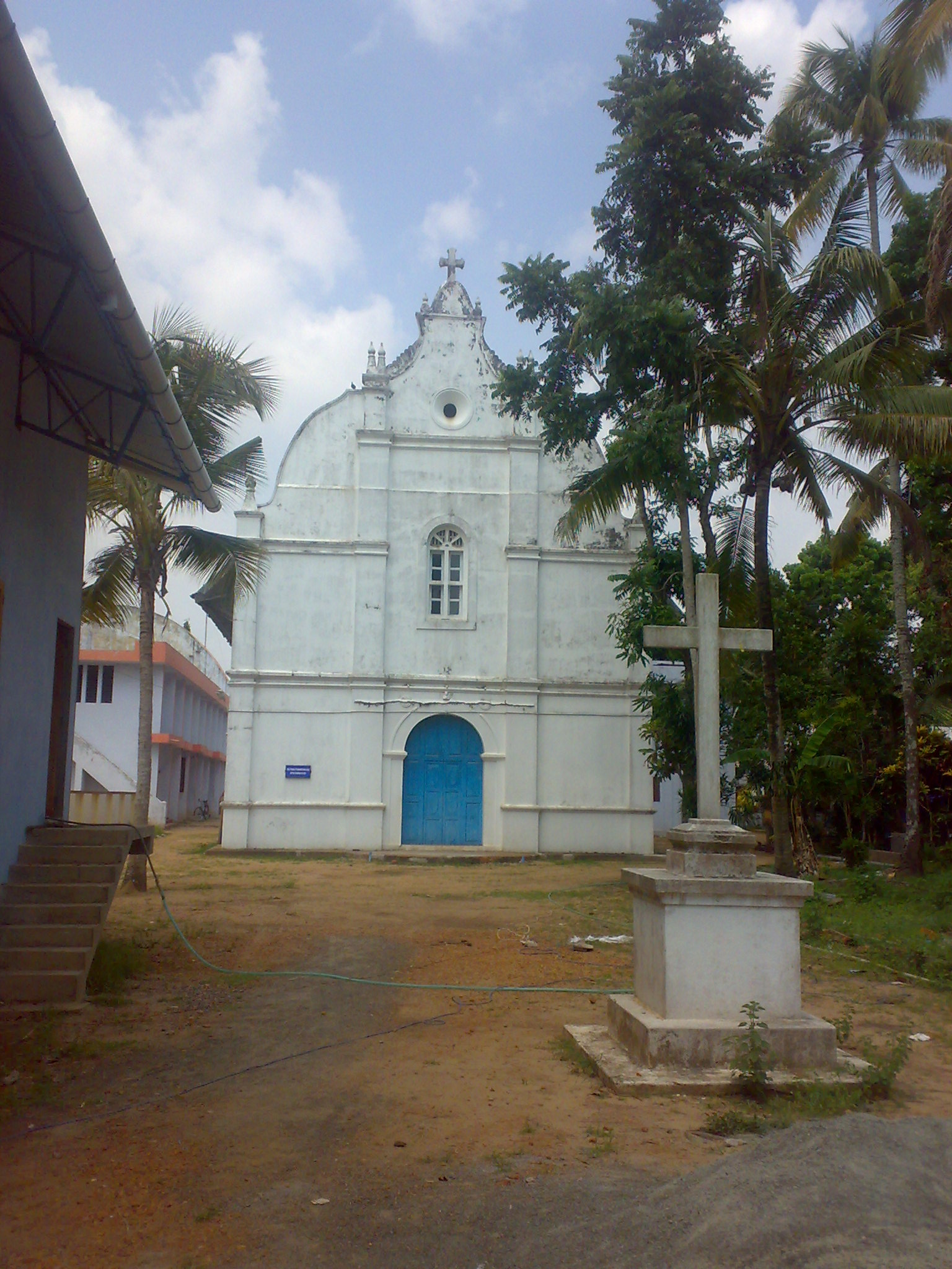 ഉദയം‌പേരൂർ സൂനഹദോസ്